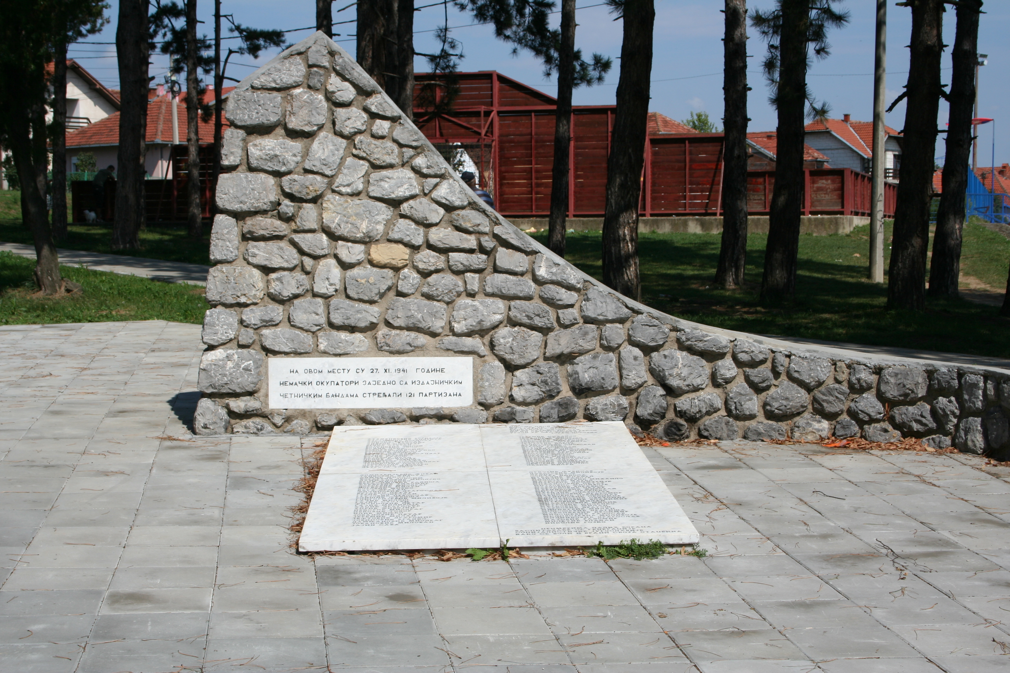 Spomen groblje na Krušiku, Valjevo